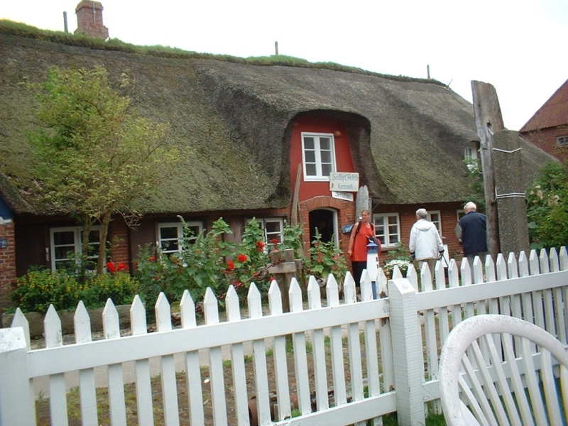 Hallig Hooge